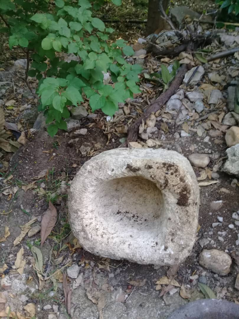 جرن ل دق القمح - أداة تراثية من الساحل السوري